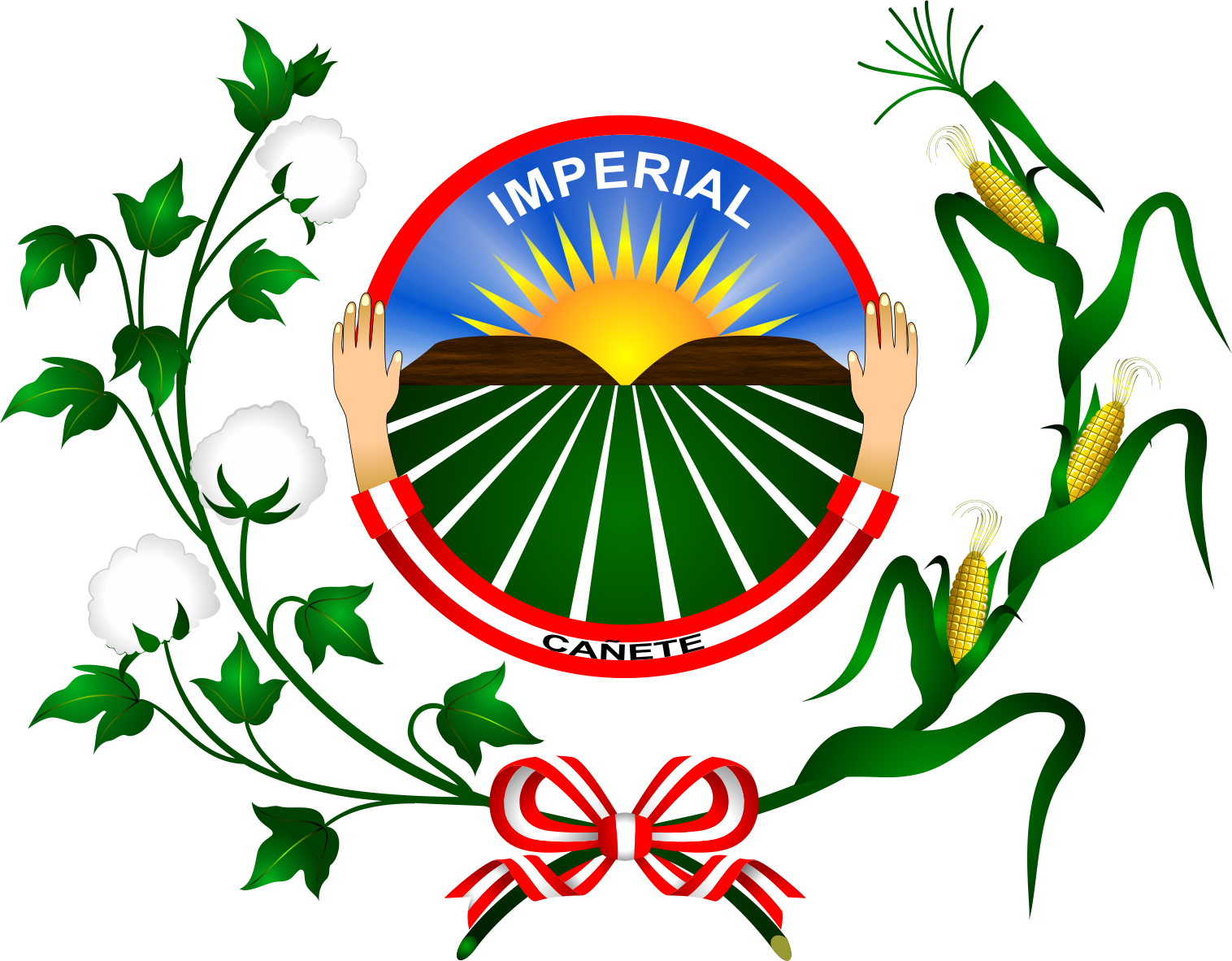 Distrito de Imperial - Provincia de Cañete - Región Lima